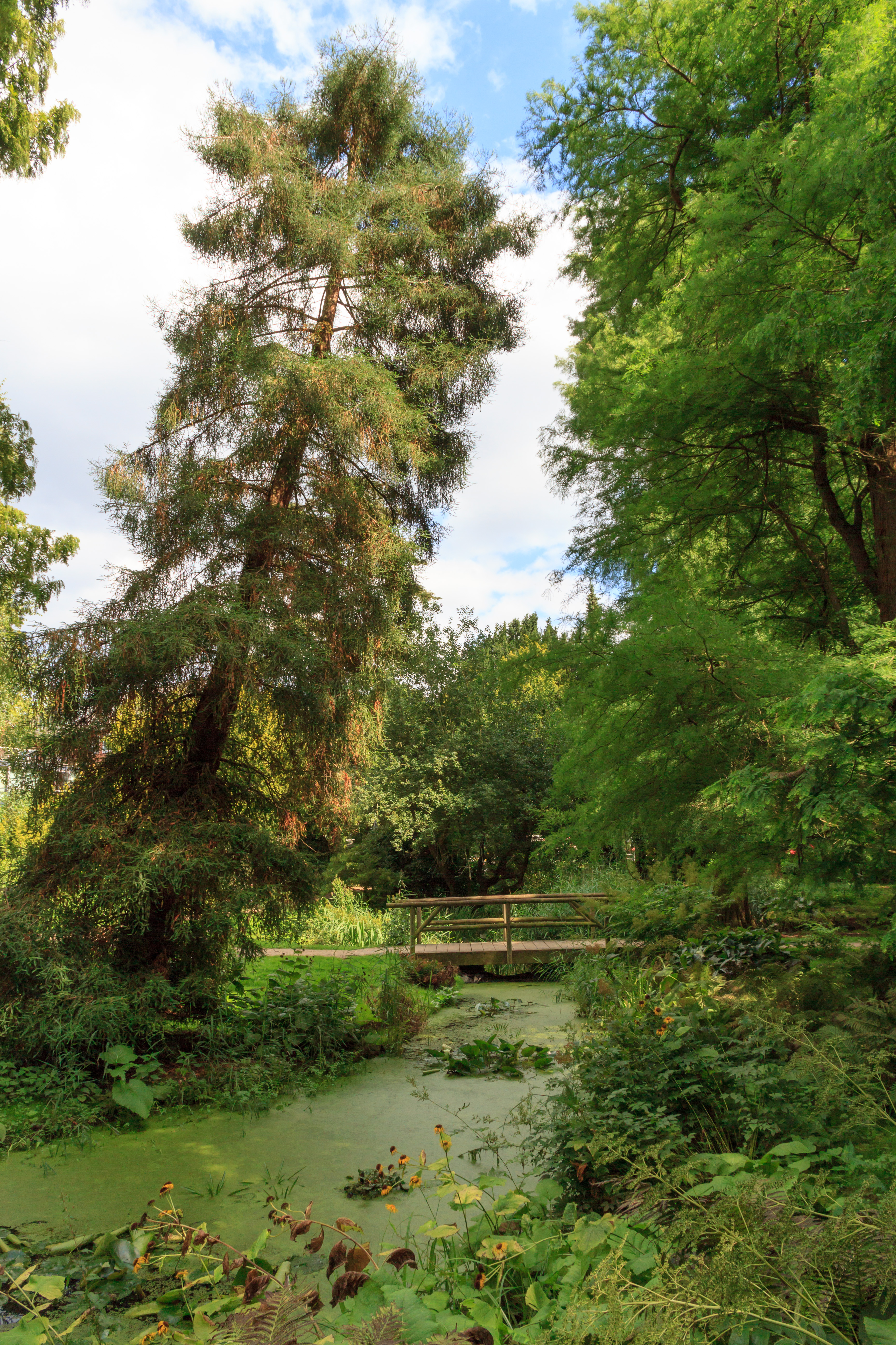 Im Alten Botanischen Garten Kiel